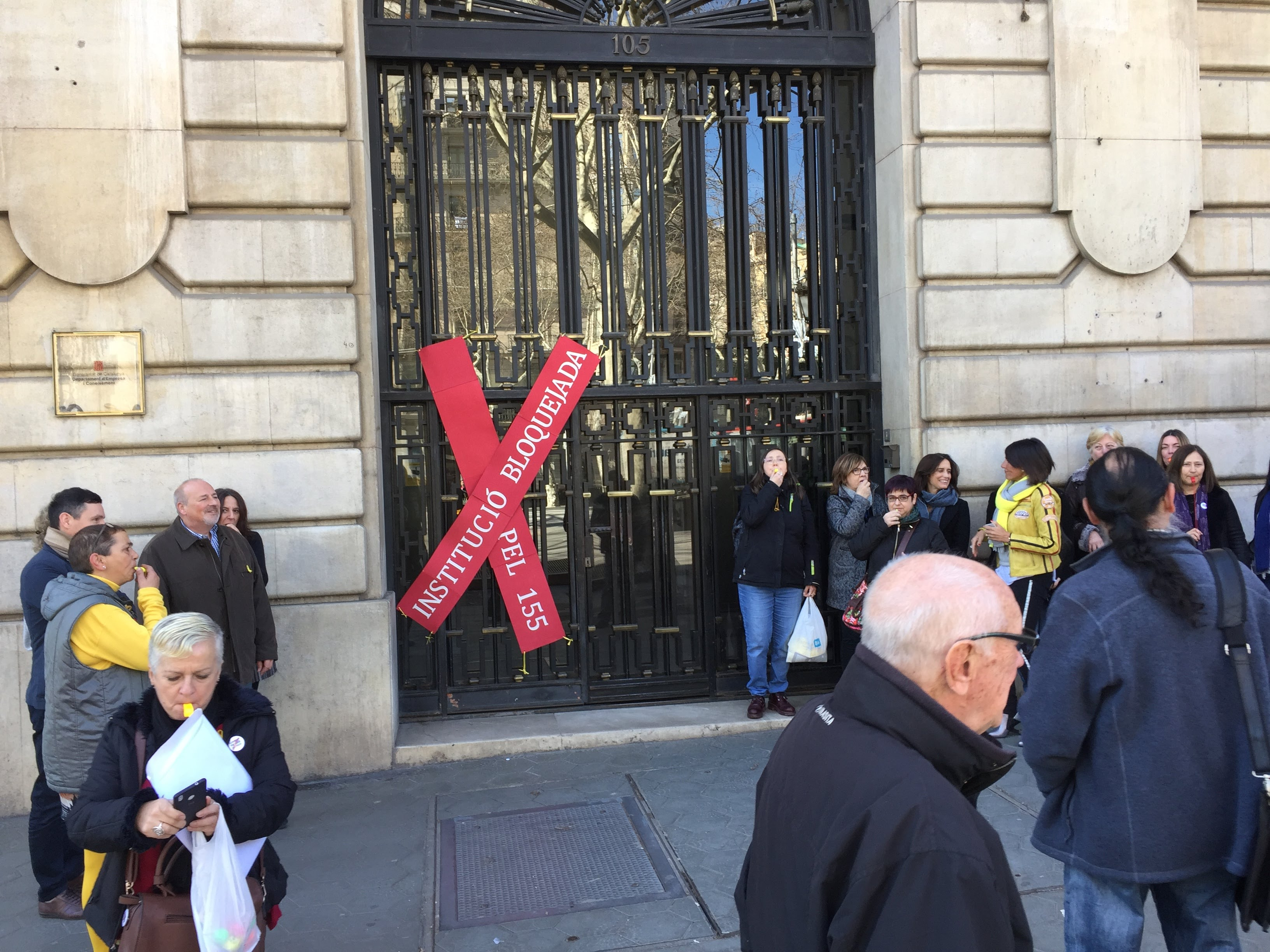 Palau Robert. Aturada dels treballadors en contra del 155